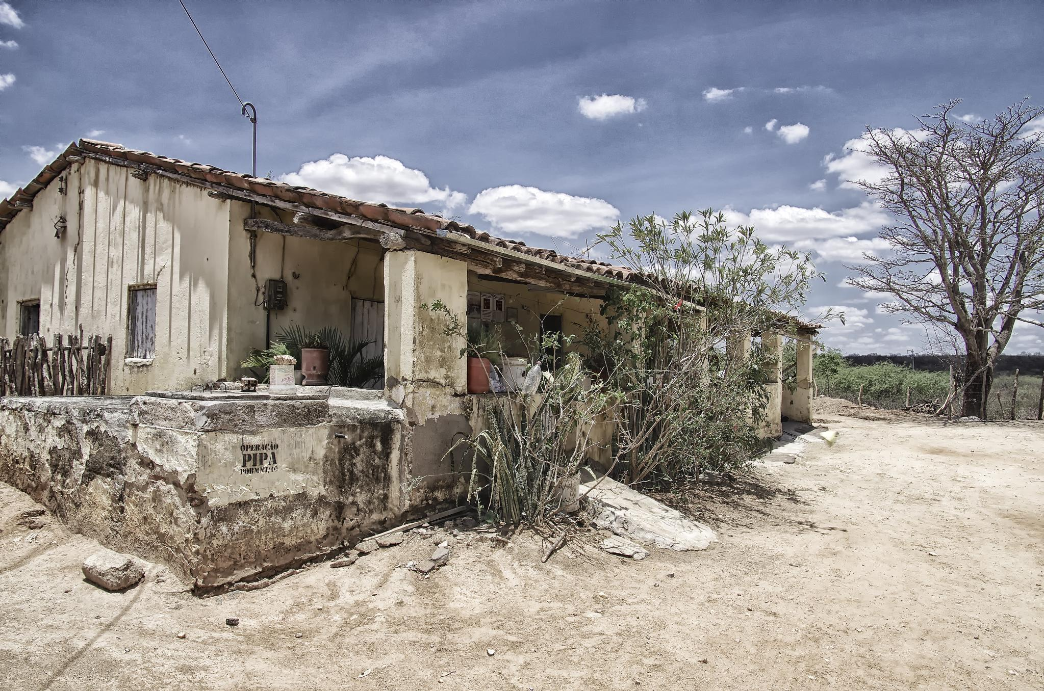 Por Caridade